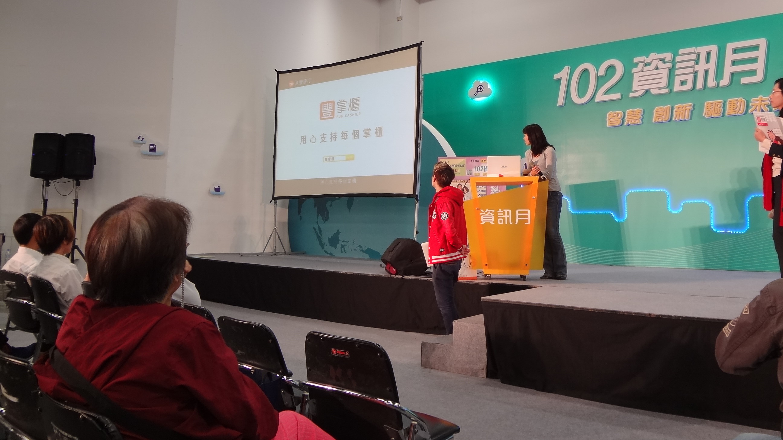 2013年台北資訊月，永豐銀行豐掌櫃說明會。